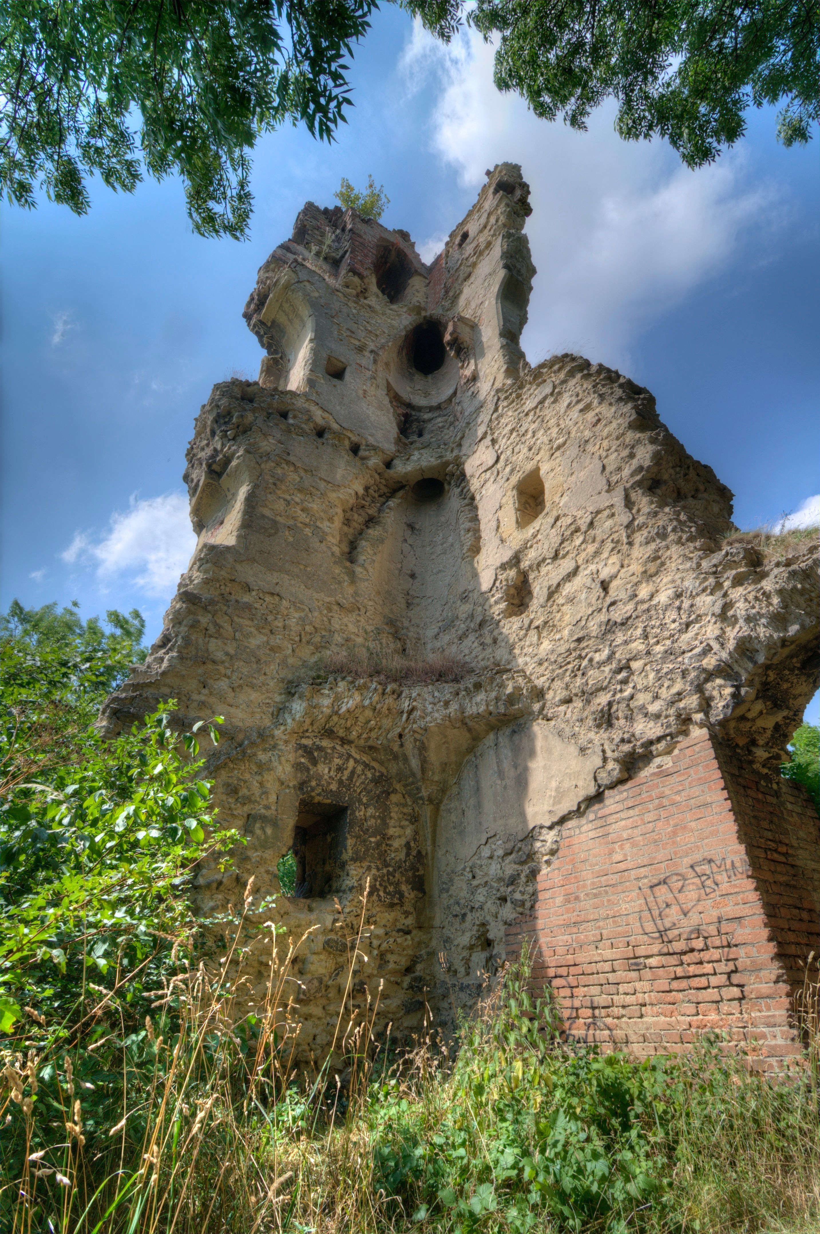 Interiér paláce - celkový pohled od severovýchodu s krbovými komíny